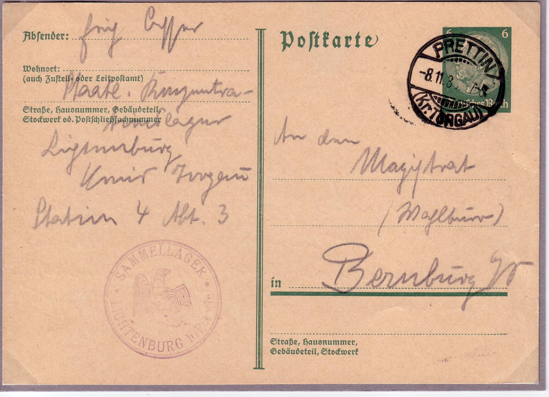 Dienstpostkarte aus dem KZ Lichtenburg von 1933 Dienstsiegel: "Sammellager Lichtenburg bei Prettin" Poststempel: "Prettin (Kr.Torgau), 8.11.1933